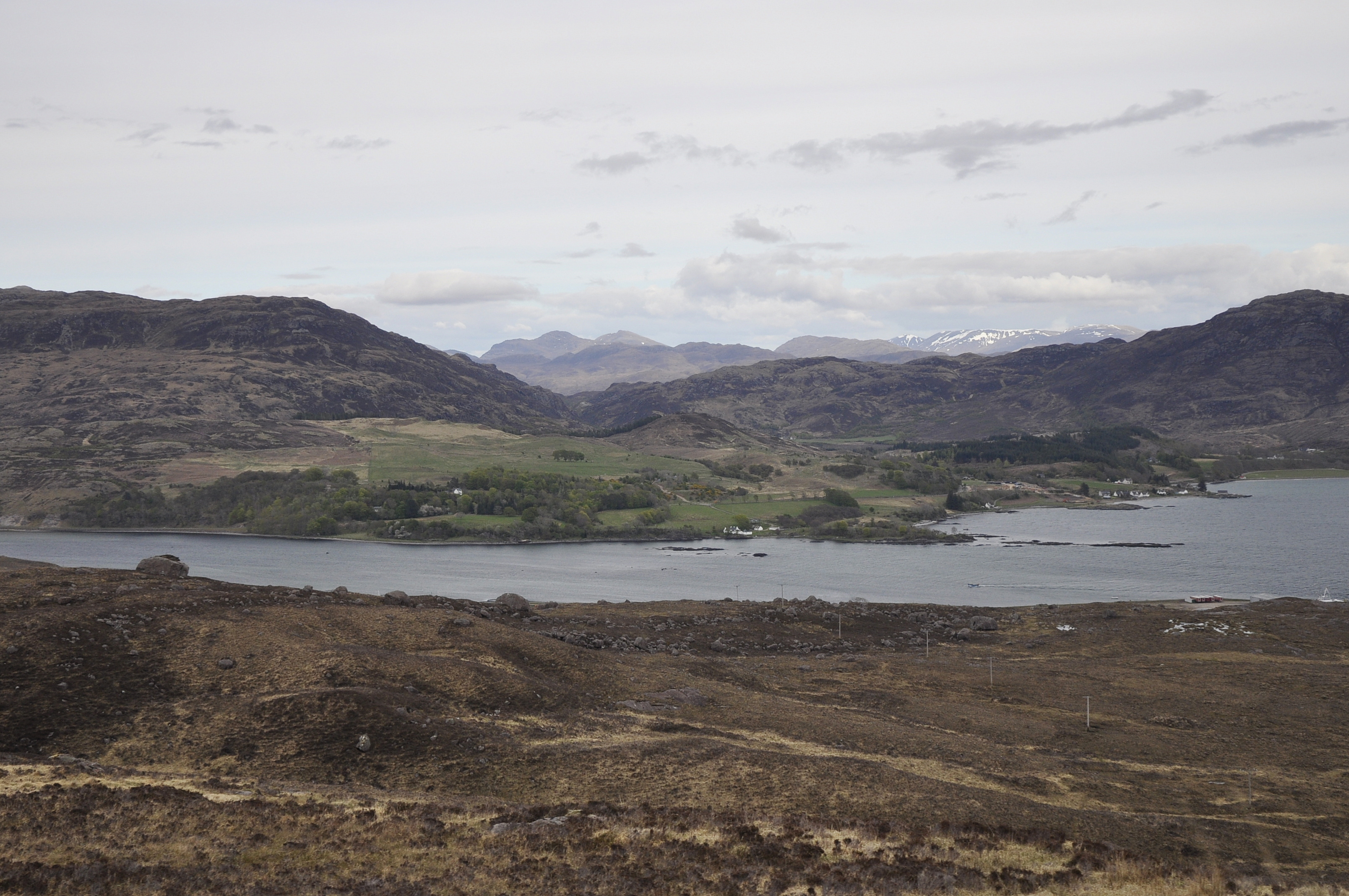 Loch Kishorn vanaf Bealach na Bà, Highland, Schotland